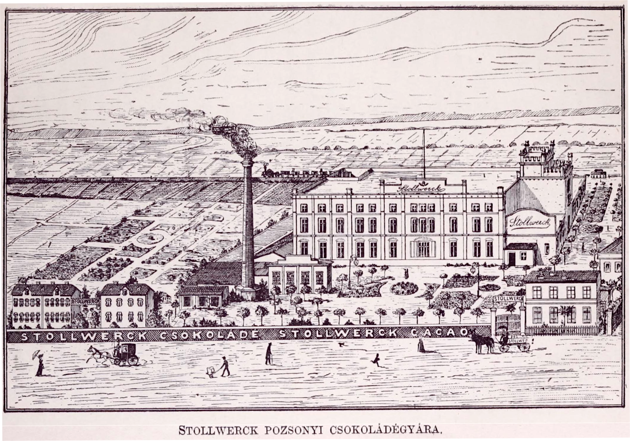 Stollwerck csokoládégyár Pozsonyban a Magyar királyságban. A Stollwerk testvérek cs. és kir. és porosz kir. udvari csokoládé-gyárosok voltak Pozsonyban. A gyár 1896-ban keletkezett és a csokoládén kívül kakaót és cukorkaneműt is gyárt. A gyár területe 35000 négyszögméter volt, melyen egy főépület és öt melléképület áll. A munkások száma 220 és ezek között 150 női munkás volt. A gyár úgy volt berendezve, hogy mai termelésének négyszeresét tudja előállítani. Piaca az egész ország és Ausztria volt. Az 1800-as években Magyarországon sokáig a cukorkák vezettek az édességek piacán. Ezek egyik legfőbb gyártója a pozsonyi székhelyű Stollwerck cég volt, amely a sokféle csoki mellett automatákból is árusított rengeteg féle cukorkát. Ezt akkora sikerrel végezte, hogy a cukorkák egy fajtáját még a következő évszázad hatvanas éveiben is stollwerknek hívták.